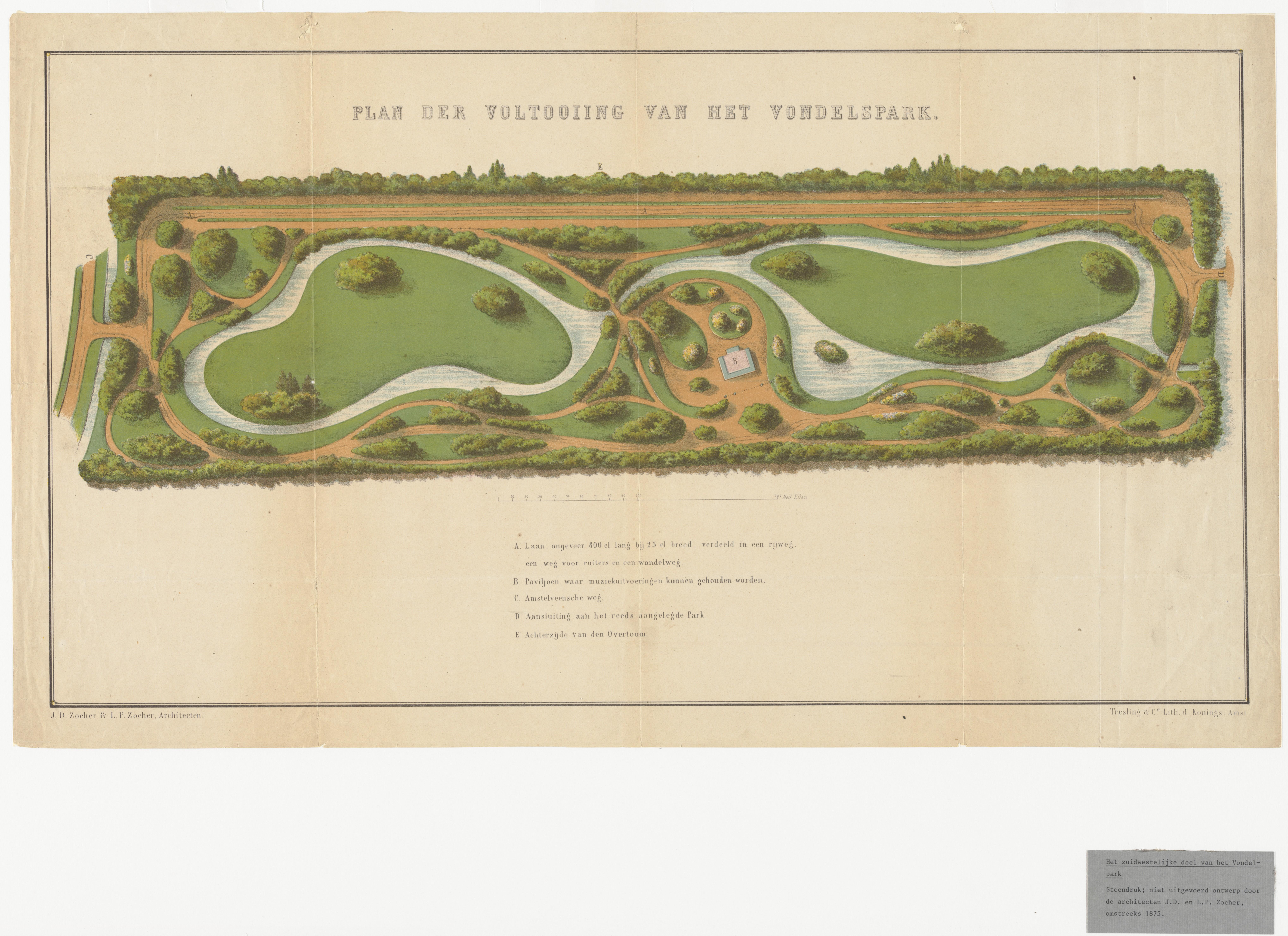 Een lithografie met een niet als dusdanig gerealiseerde uitbreiding van het Vondelpark te Amsterdam. Ontwerp van J.D. Zocher en diens zoon, L.P. Zocher